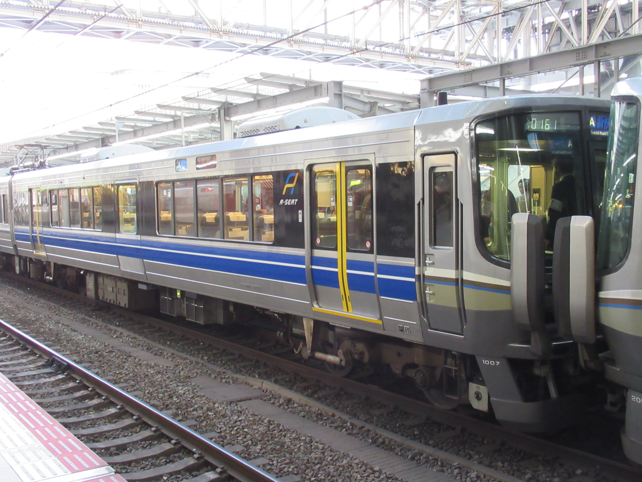 クハ222-1007 Aシート車 大阪駅